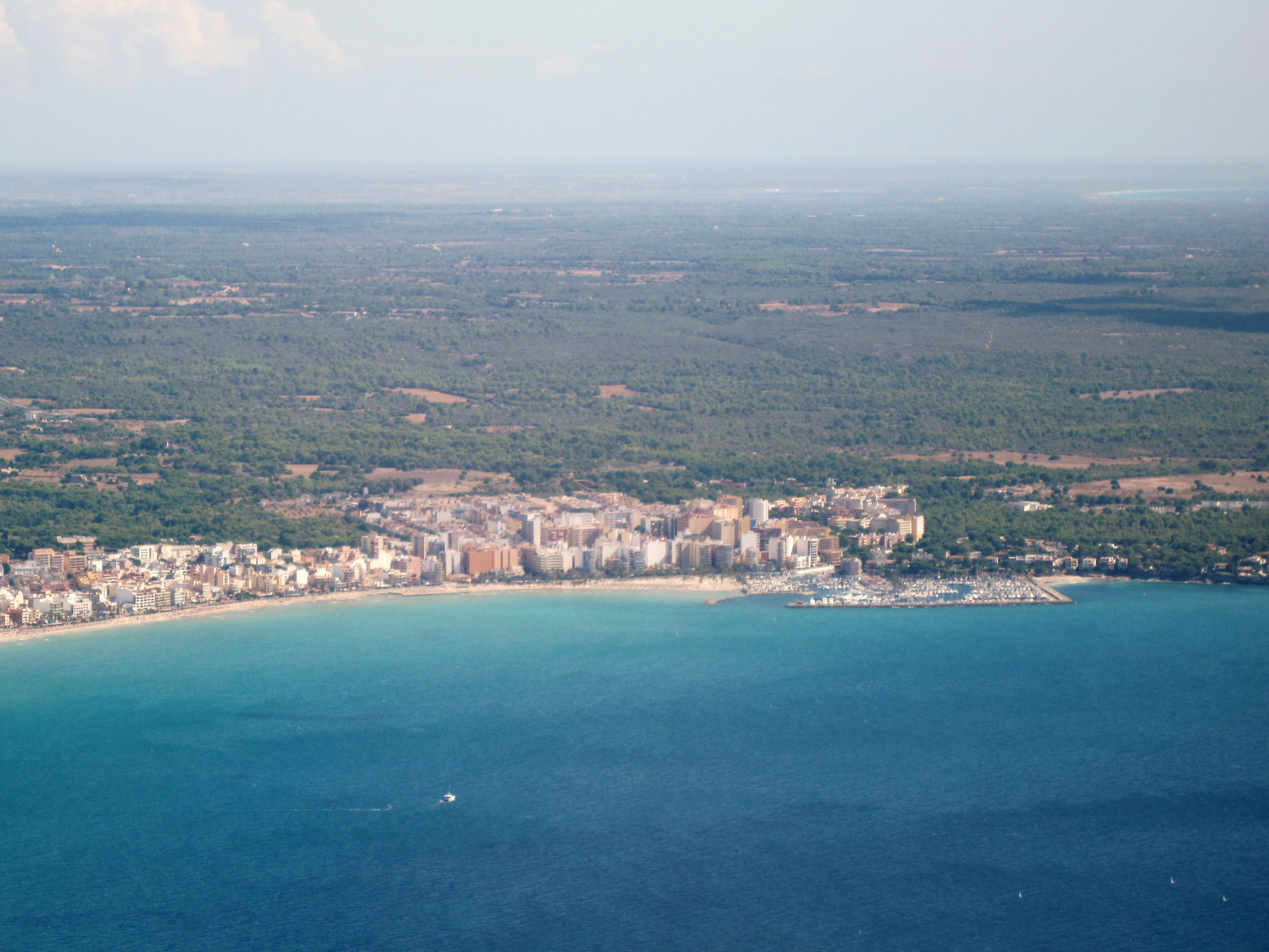 Luftbild von S’Arenal an der Platja de Palma, Mallorca, Spanien